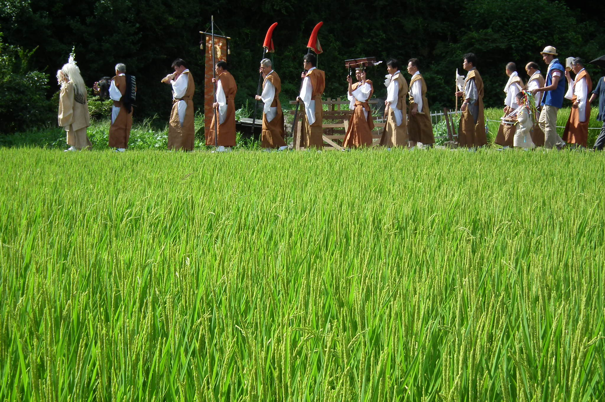 Hohokabe-jinja Festival 波々伯部神社 8月第1土・日曜日（ 旧暦6月14日）例祭「おやま行事」